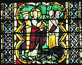 Maestro di San Francesco, ss bartolomeo e matteo, S. Matteo addormenta i dragoni dei maghi Zaroes e Arphascal